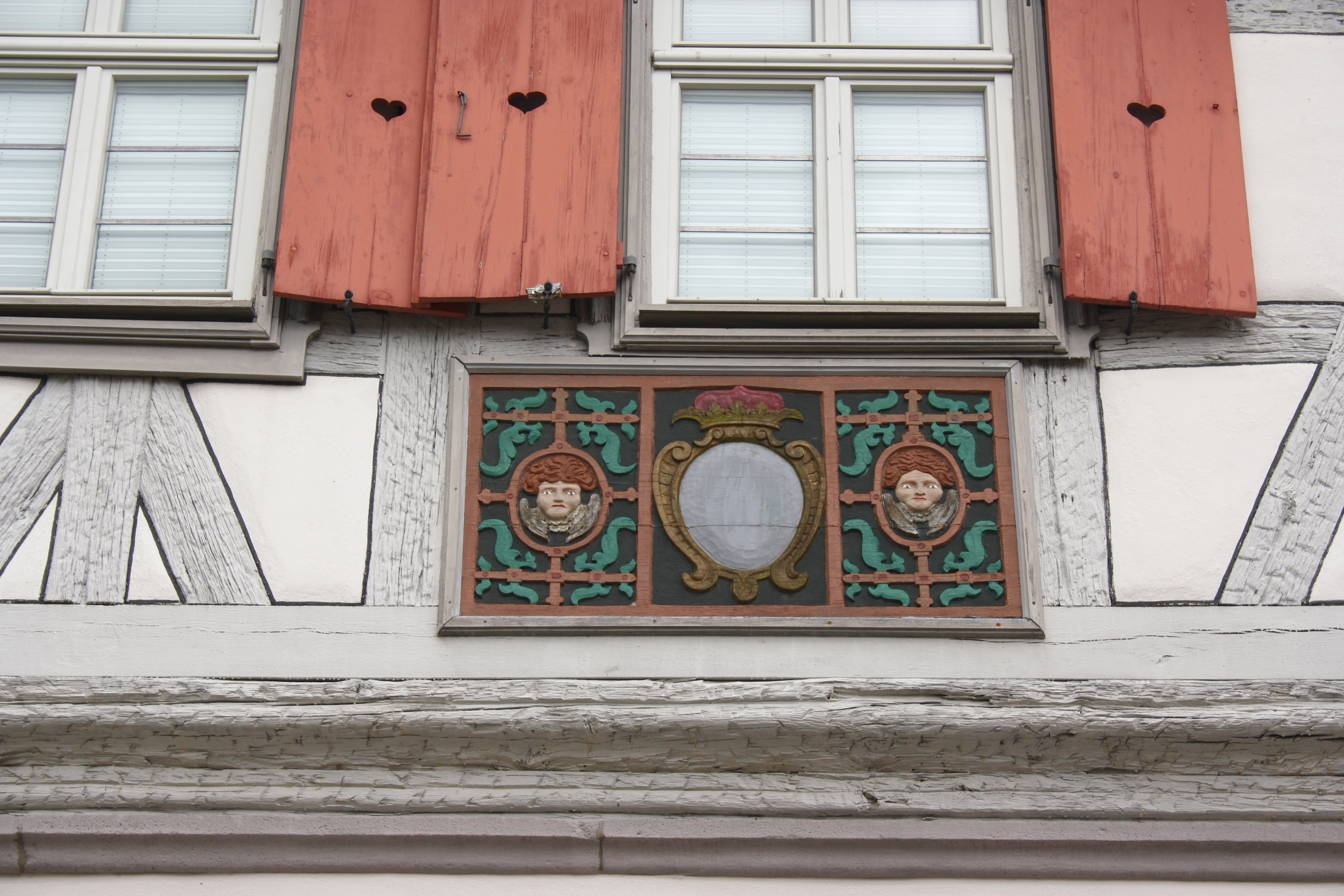 Museum in Grünsfeld im Main-Tauber-Kreis (Baden-Württemberg), Schloßstraße 7/9